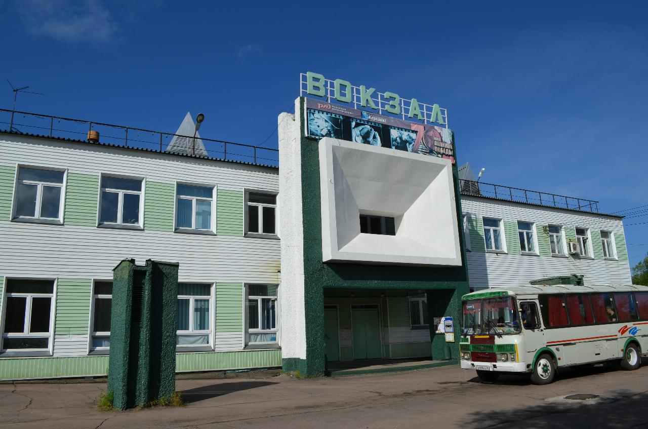 Вокзал железнодорожной станции Беркакит